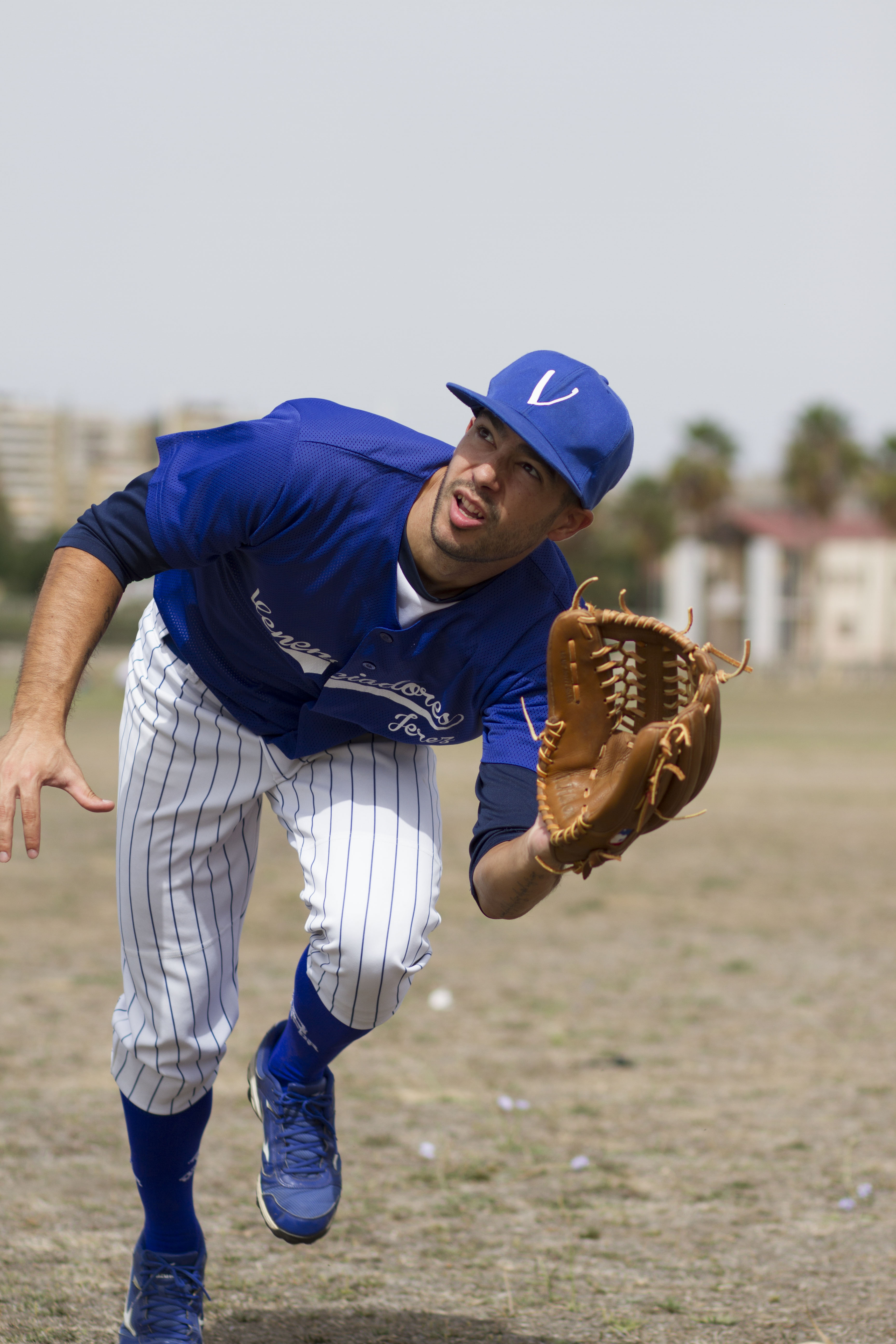 Jugador venenciador en un entrenamiento